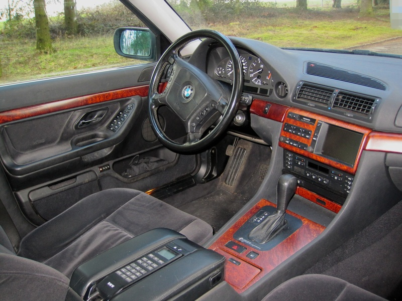 BMW E38 von 1997, Innenraum mit Bildschirmnavigationssystem und Telefon